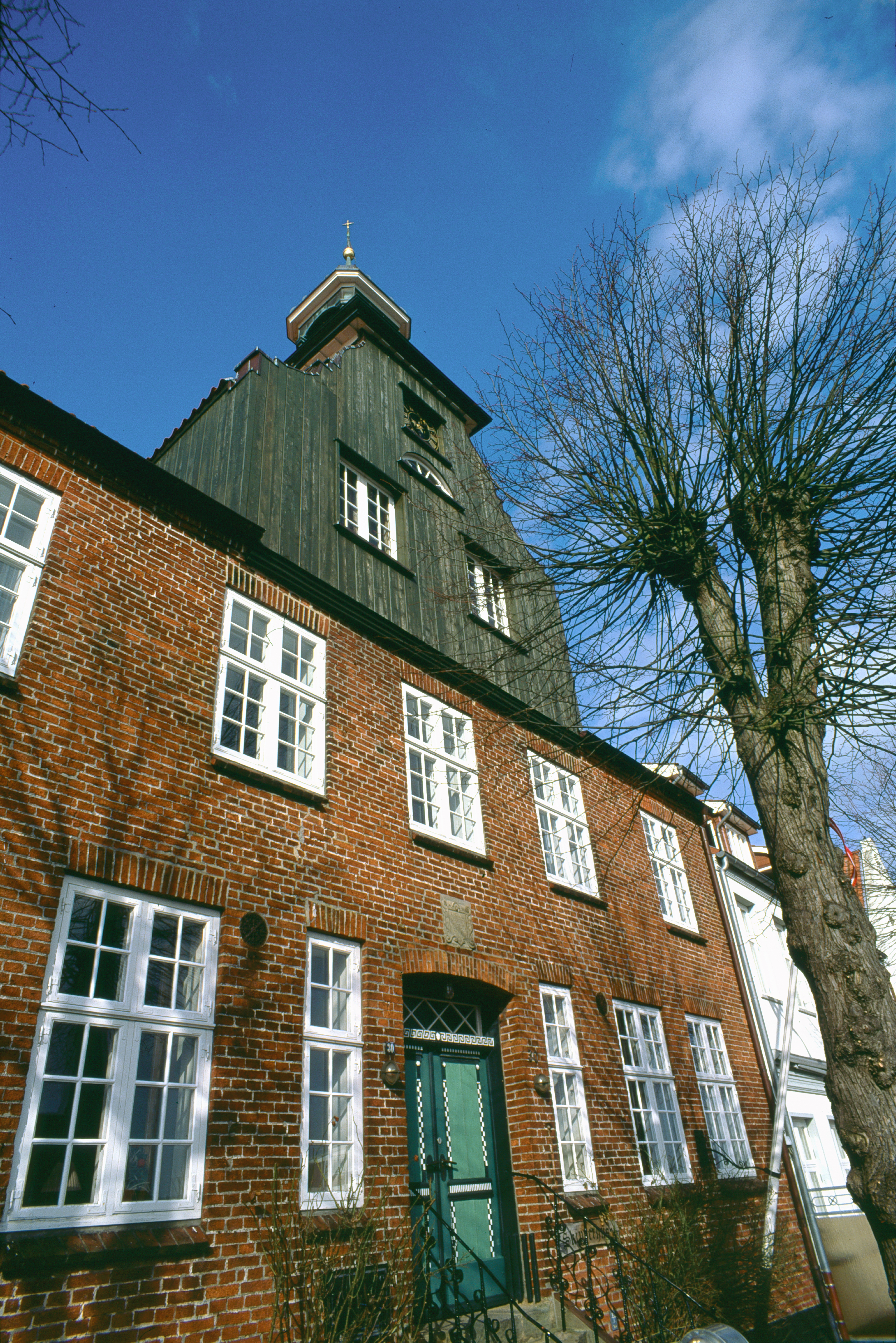 Halbinsel Eiderstedt, Tönning: Skipperhuset, Am Hafen 30. 1624/25 von der Tönninger Schiffergesellschaft als Unterkunft für Seeleute erbaut, Später Lotsenschule, Freimaurerhaus und heute Jugendherberge der dänischen Minderheit